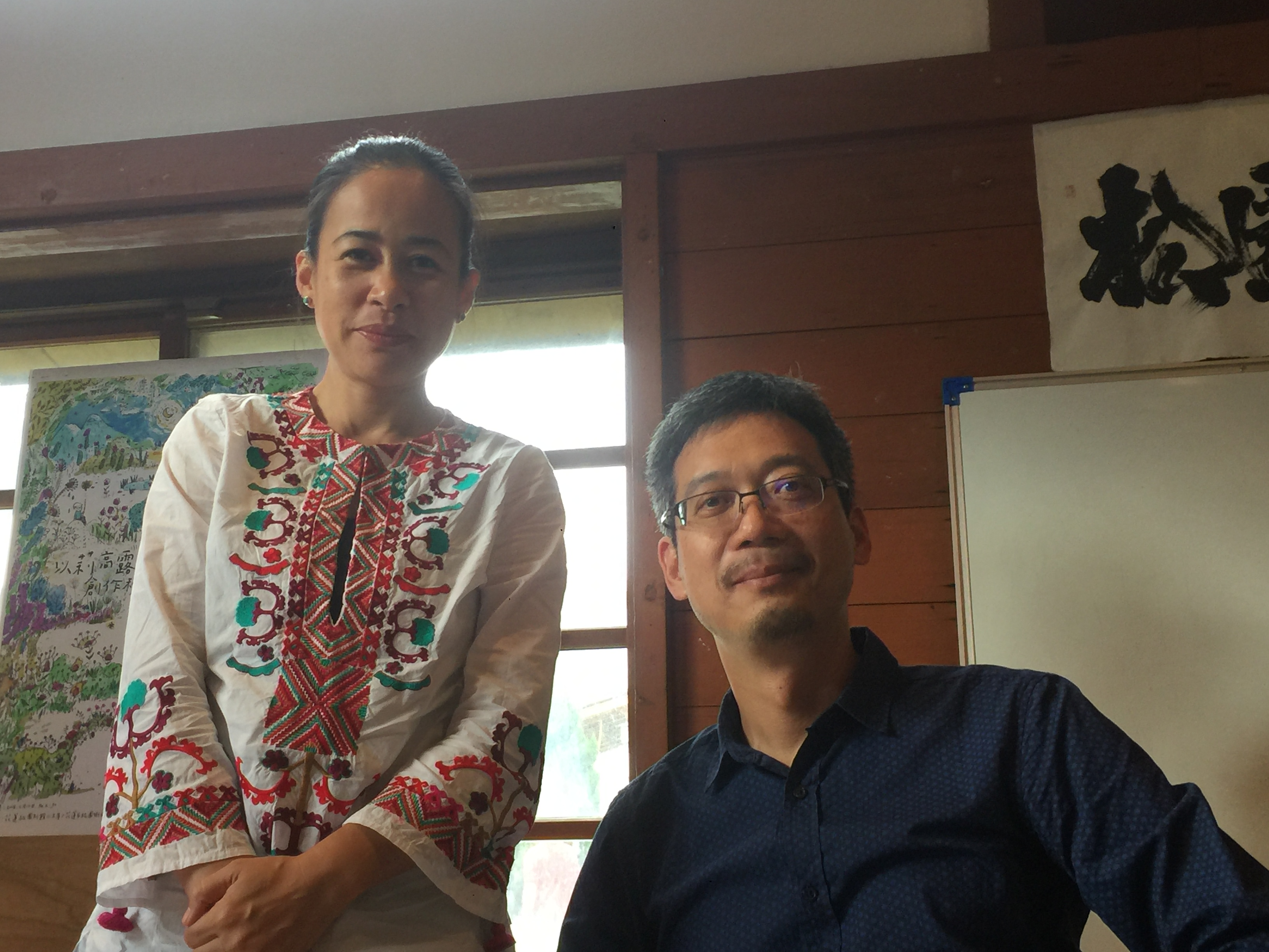 陳冠宇與以莉高露